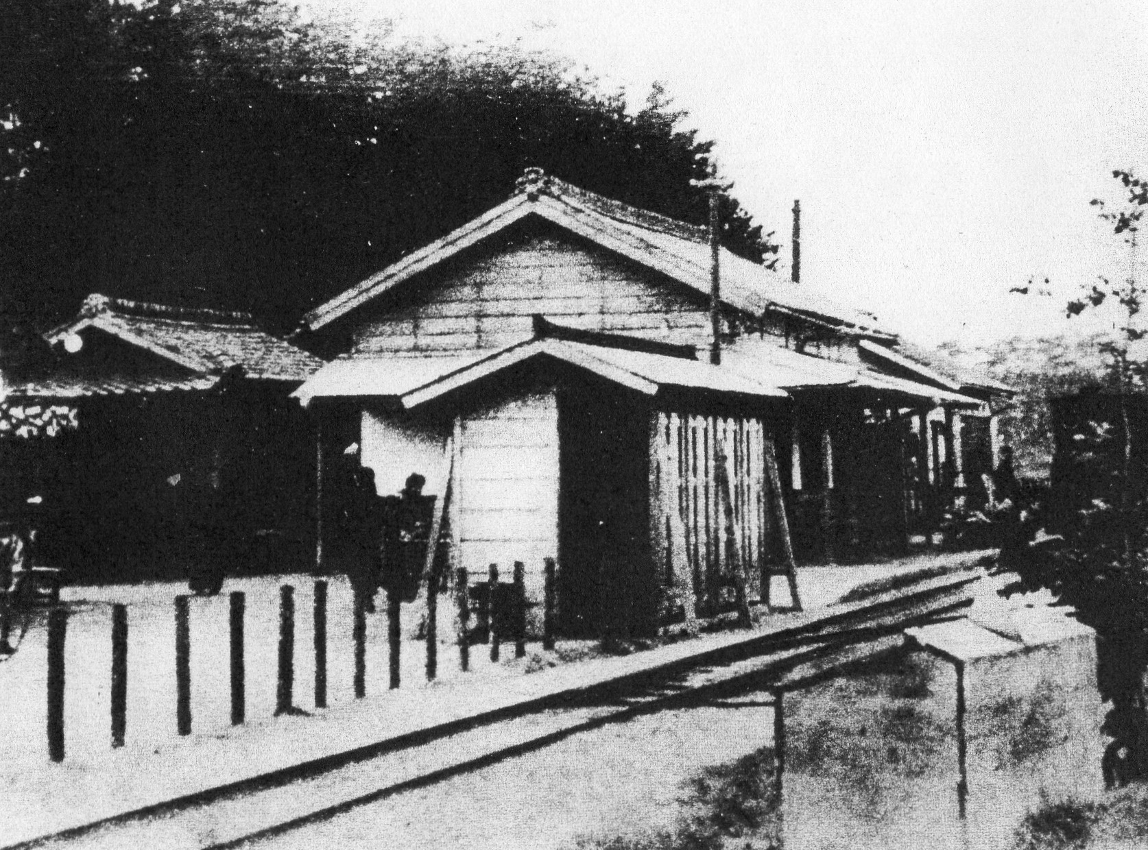 明治末期の天王門駅（キャプションには明治末期とあるが、右頁の解説では大正2年完成の駅舎としている）